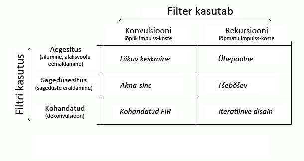 Digitaalsete filtrite liigitus